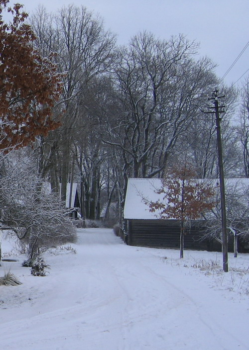 Autoriaus nuotrauka, 2005.12.25. Stračnių km. žiemą. Fotografuota nuo ežeriuko pusės. Nuotrauka gali būti platinama pagal GFDL licenciją.